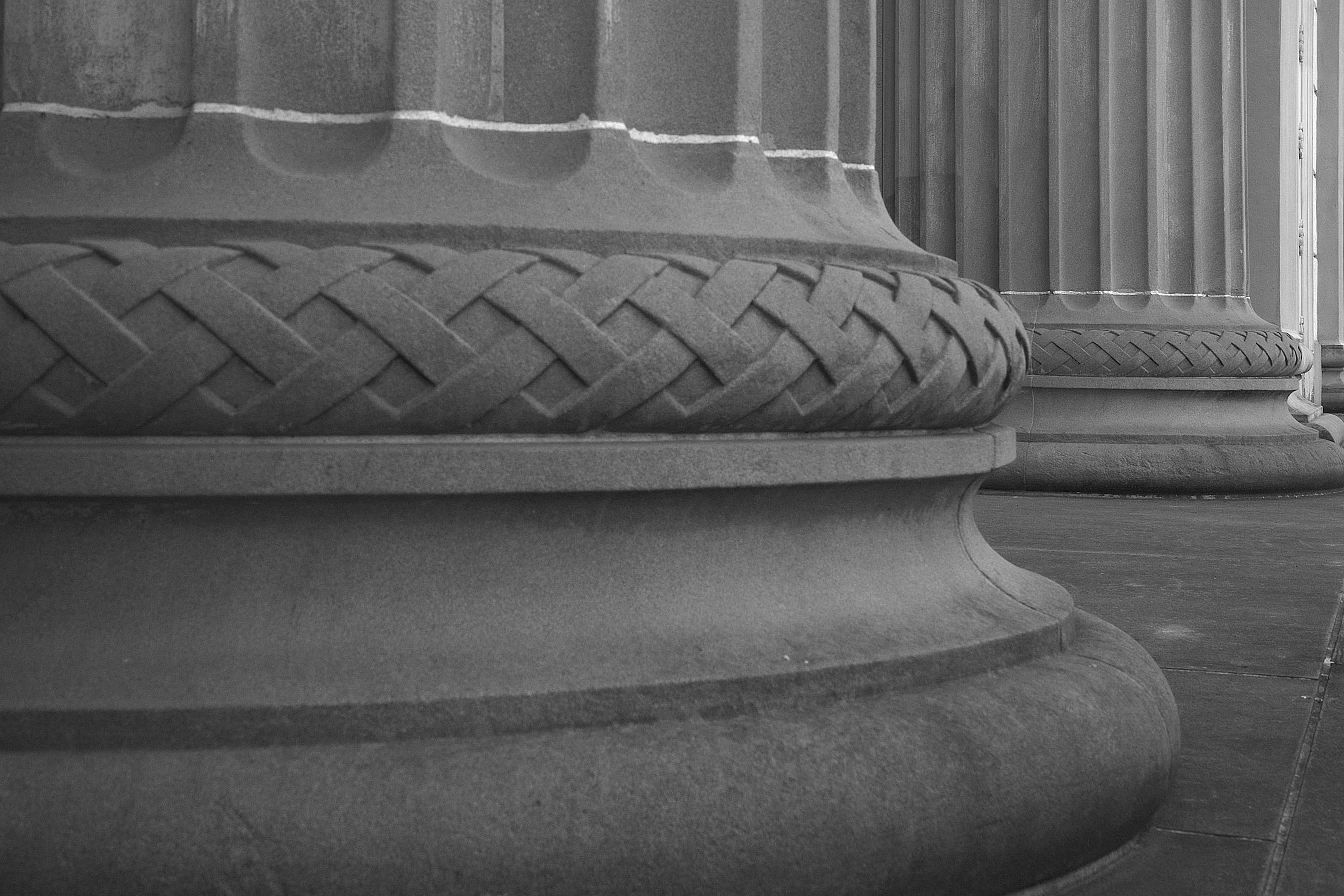 Die attische Basis der Säulen am Eingang der Neumünsterkirche in Zürich, Schweiz